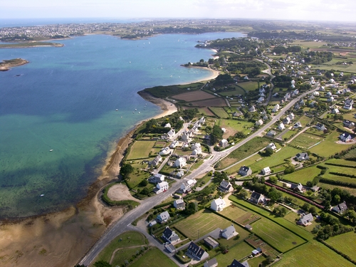 vue aérienne de Landéda Finistère France